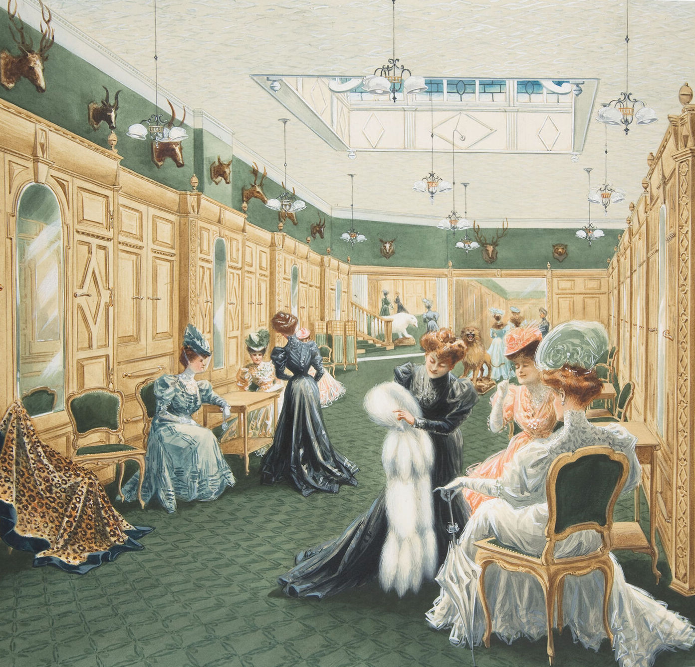 Pelzsalon eines Londoner Kürschners. Französisch, 19. Jahrhundert.